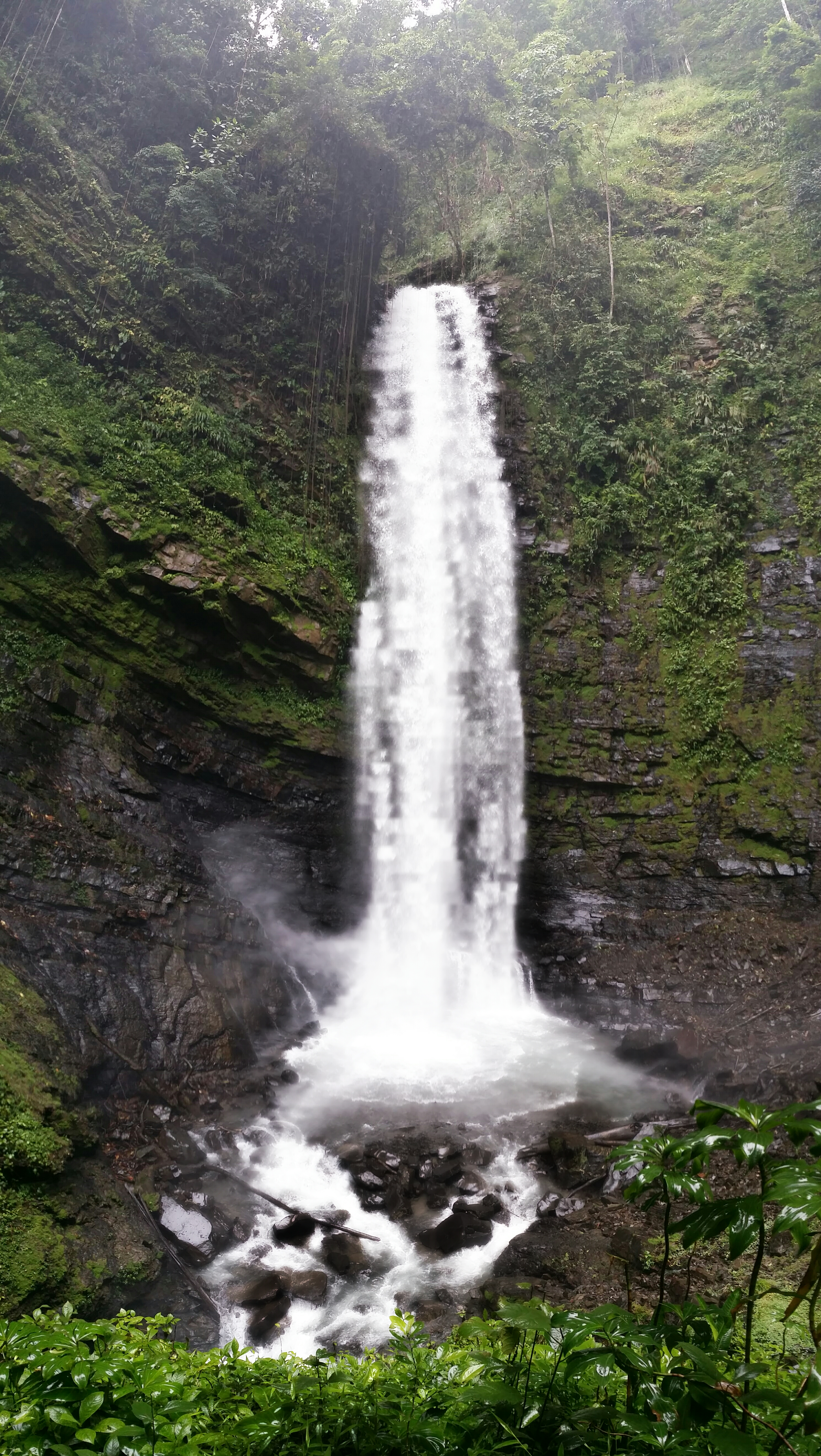 55 metros de altura